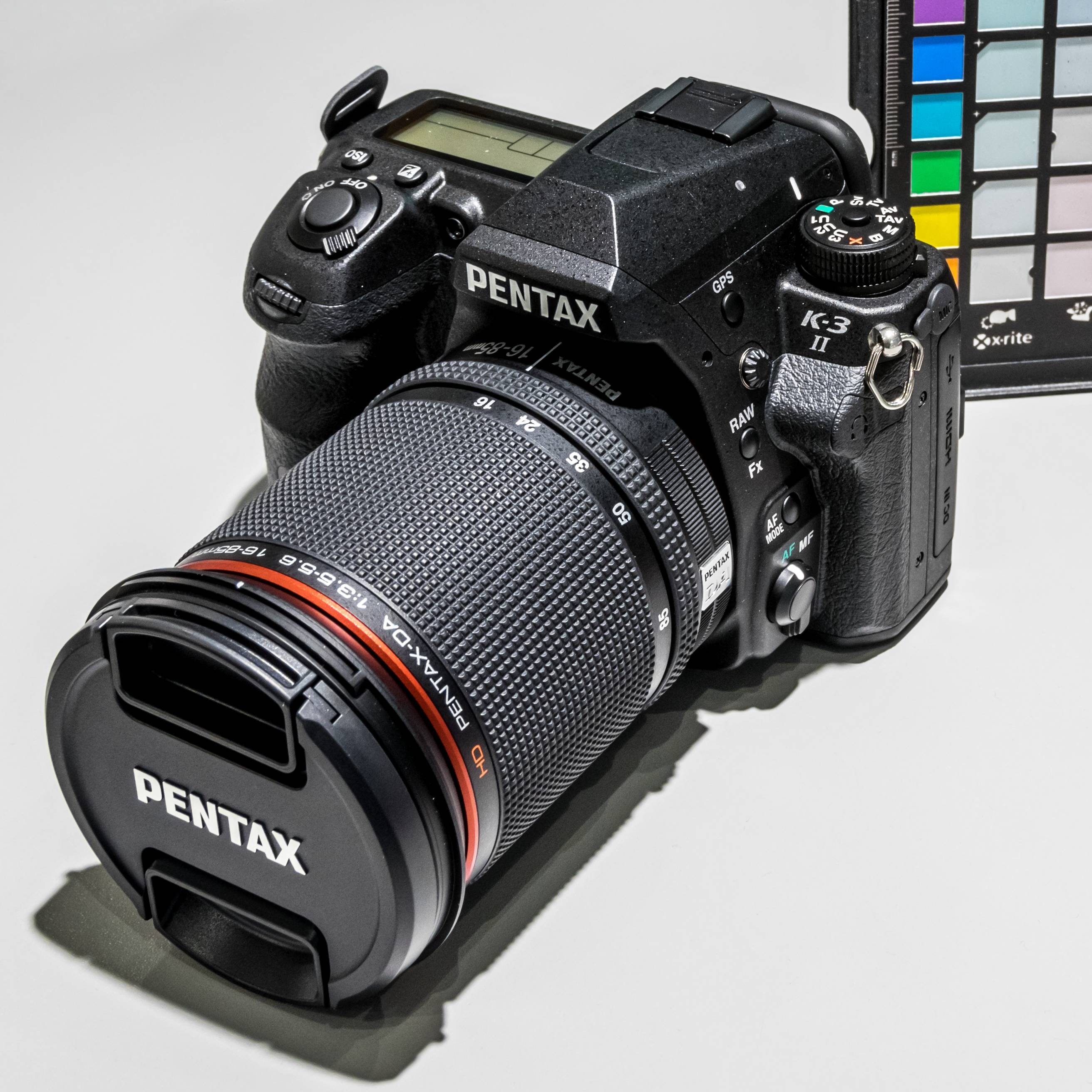 Bilder von Pentax / Ricoh Kameras. Pentax K3 - II